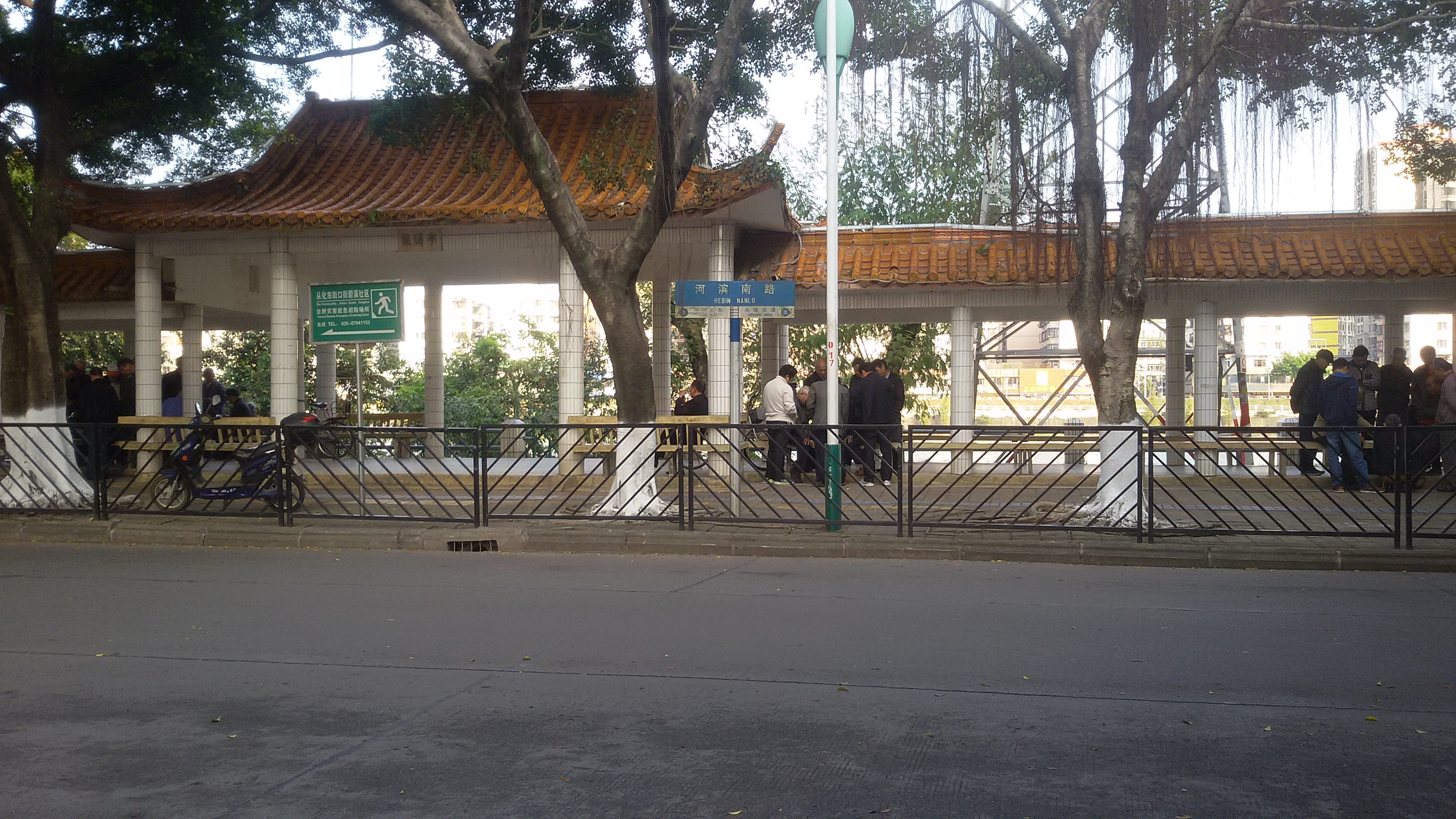 粵語: 從化河濱南路（河濱公園附近）